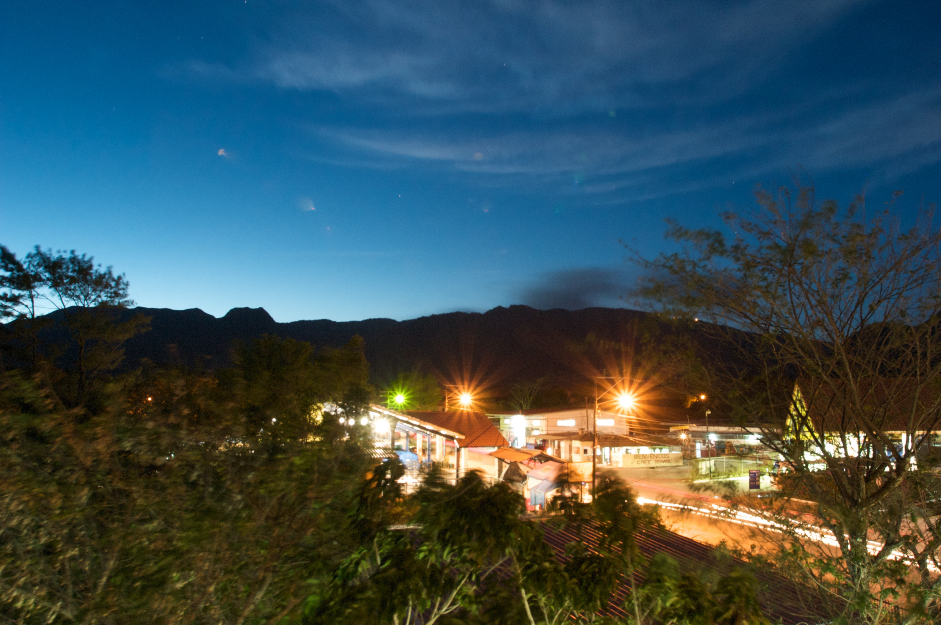 El Valle at nightfall.